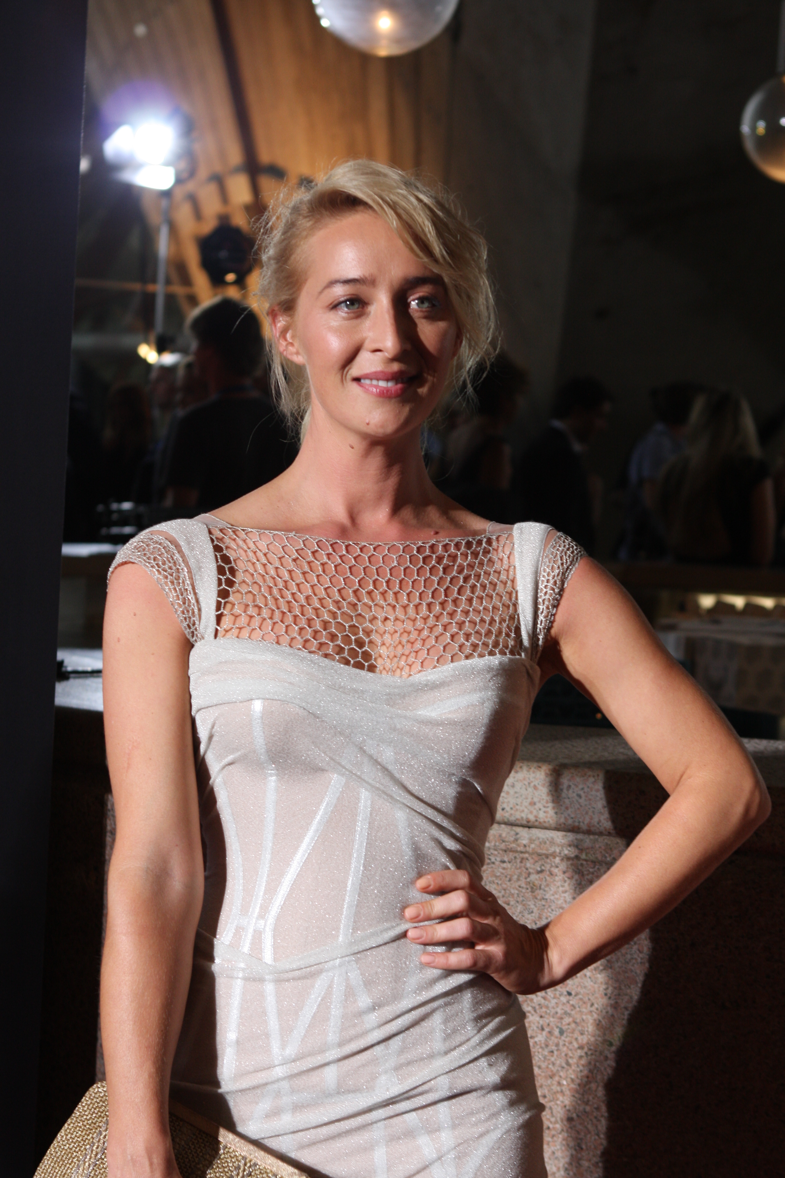 Asher Keddie